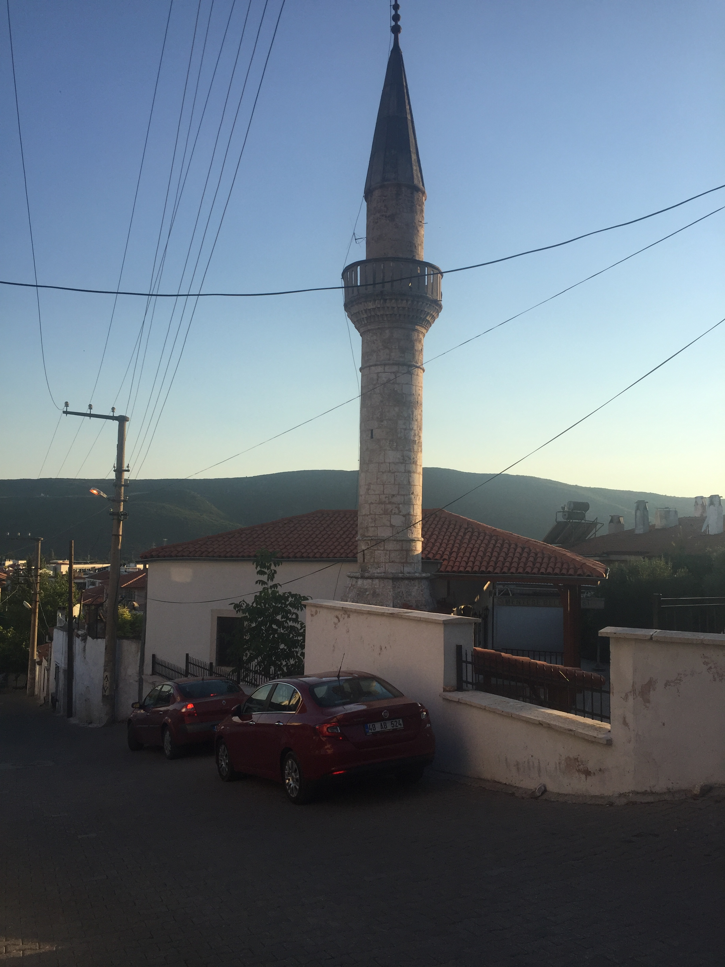 Sekibaşı Camii, Muğla